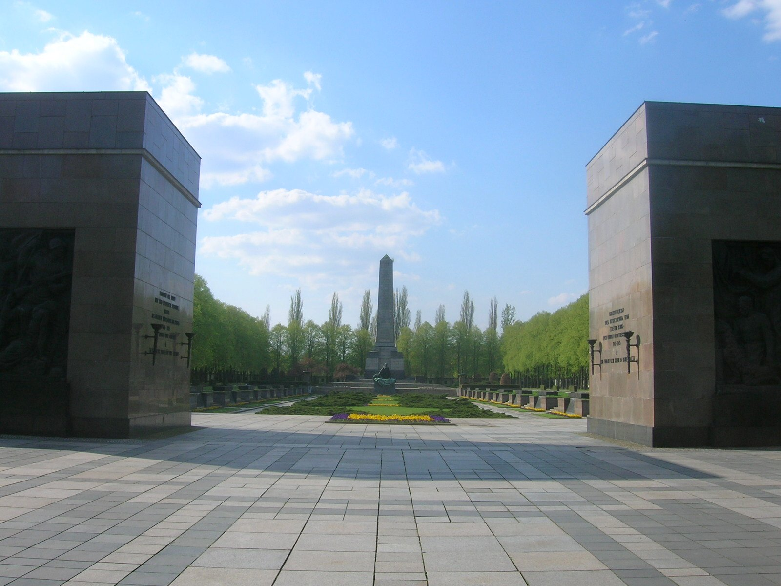 Sowjetisches Ehrenmal in der Schönholzer Heide im Berliner Bezirk Pankow photo taken by Mazbln on May 3, 2006